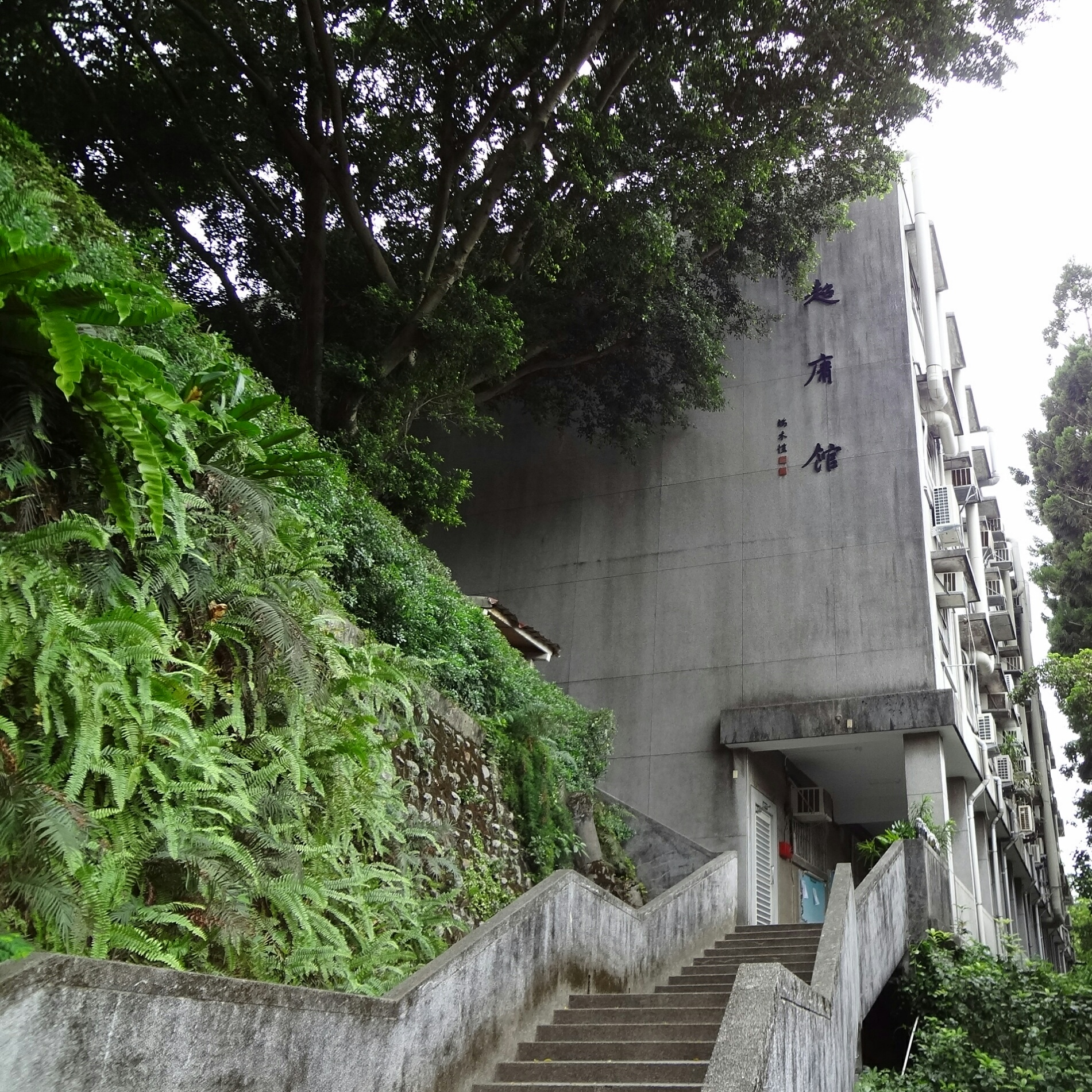 東吳大學外雙溪校區超庸館，為紀念故校長石超庸而命名，館名由端木愷題字。